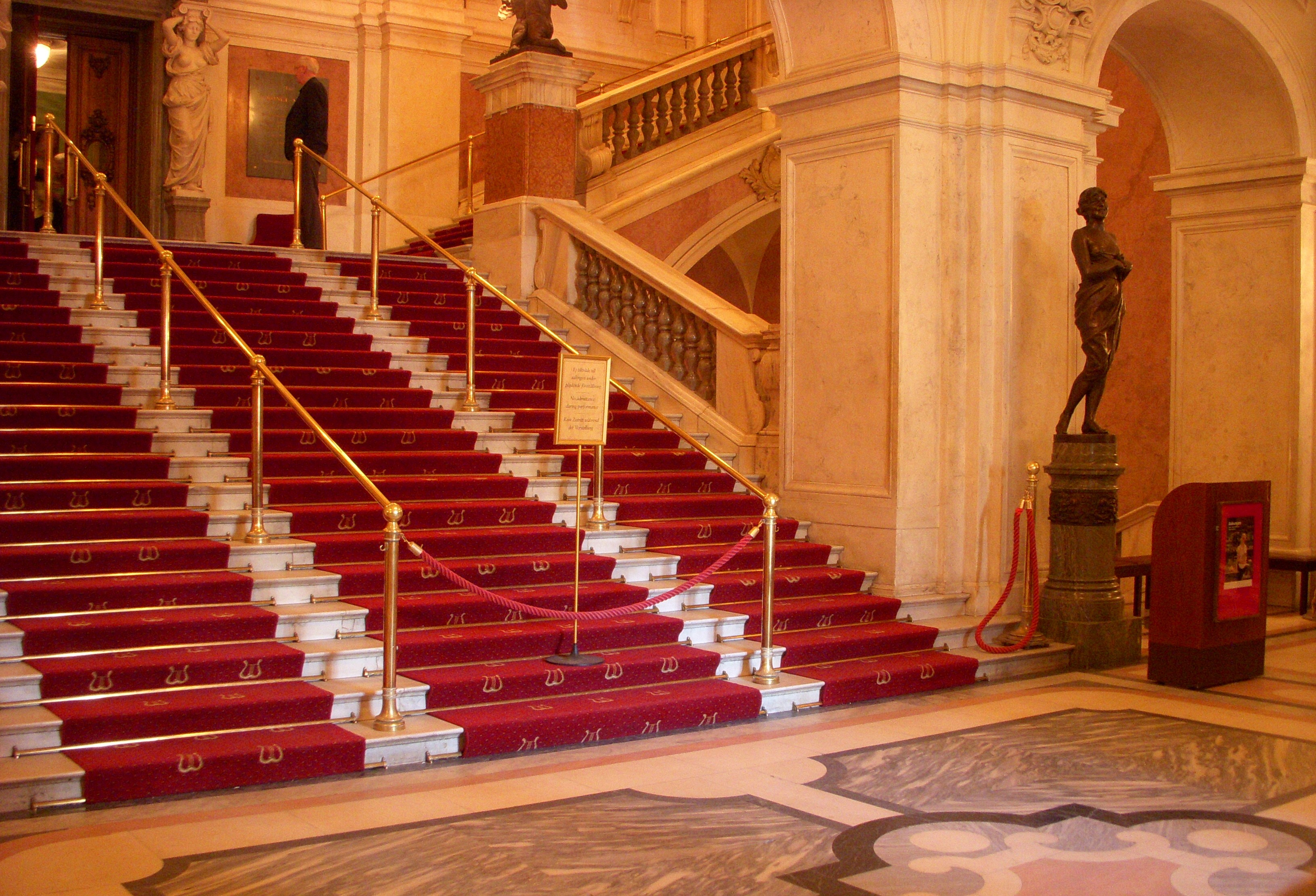 Foajén och huvudtrappan i Kungliga Operan i Stockholm